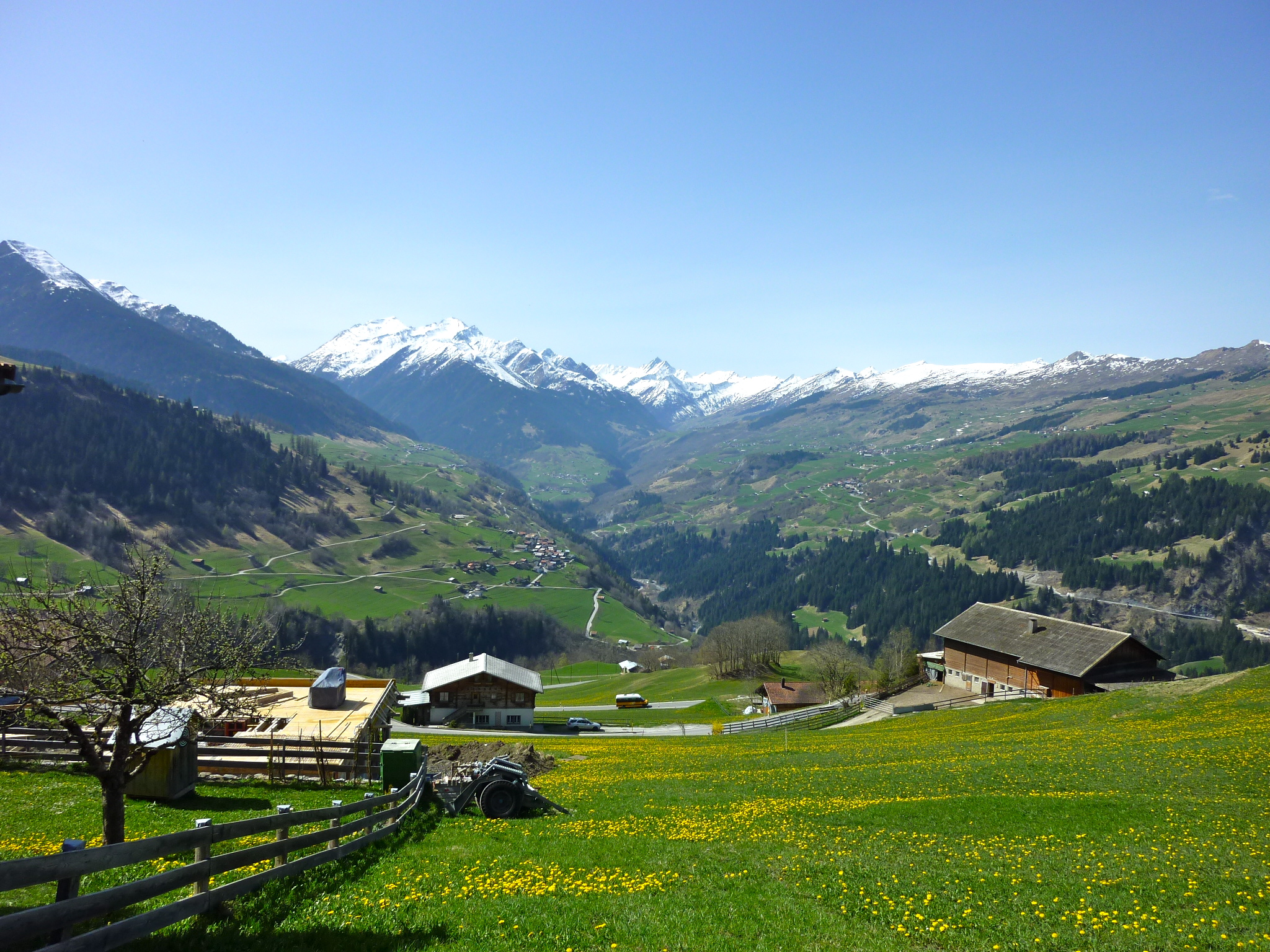 Lugnez von Riein Rumantsch: Riein cun vista sin la Val Lumnezia